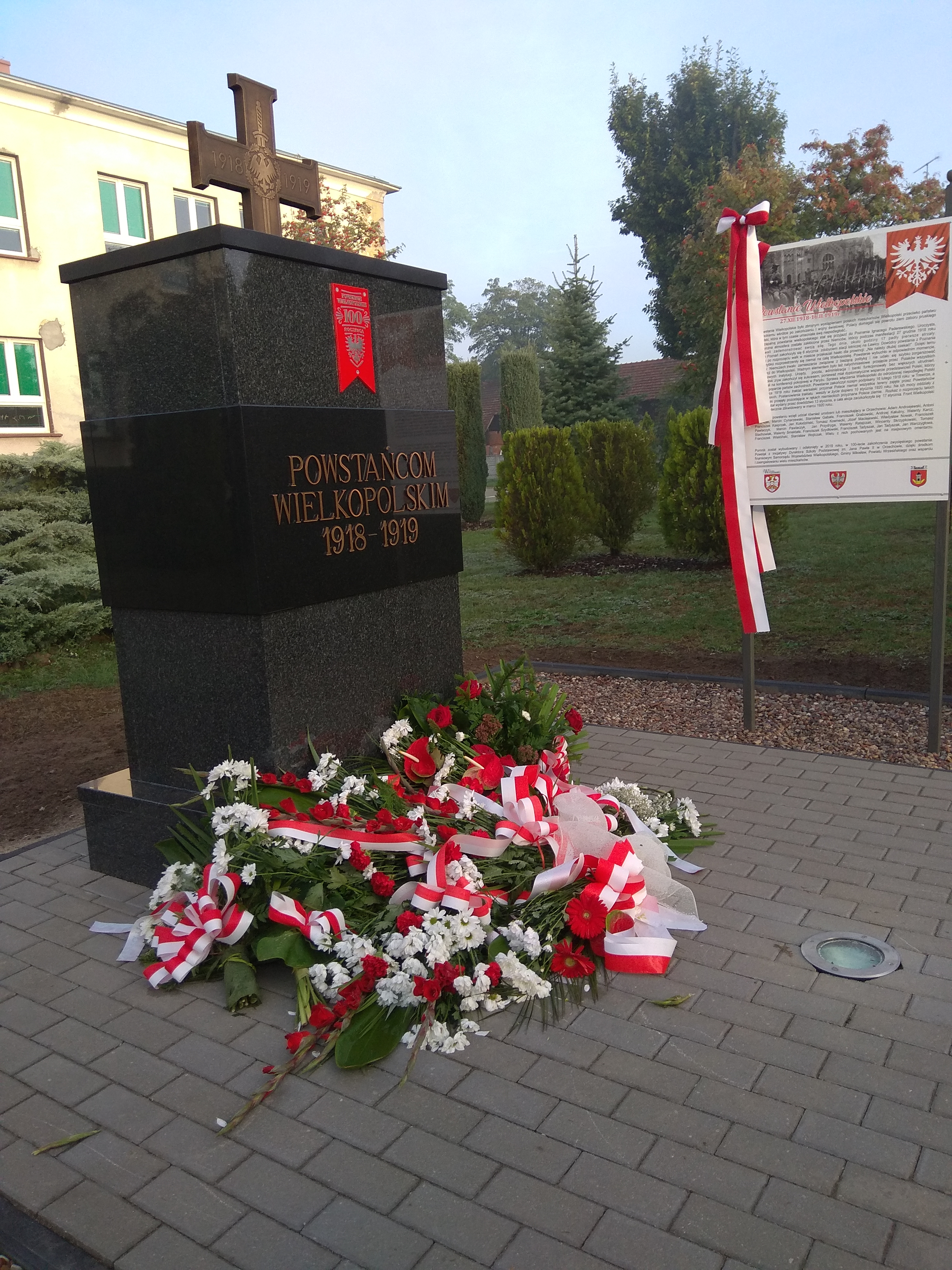 Pomnik powstańców wielkopolkich w Orzechowie przy ZSP w orzechowie